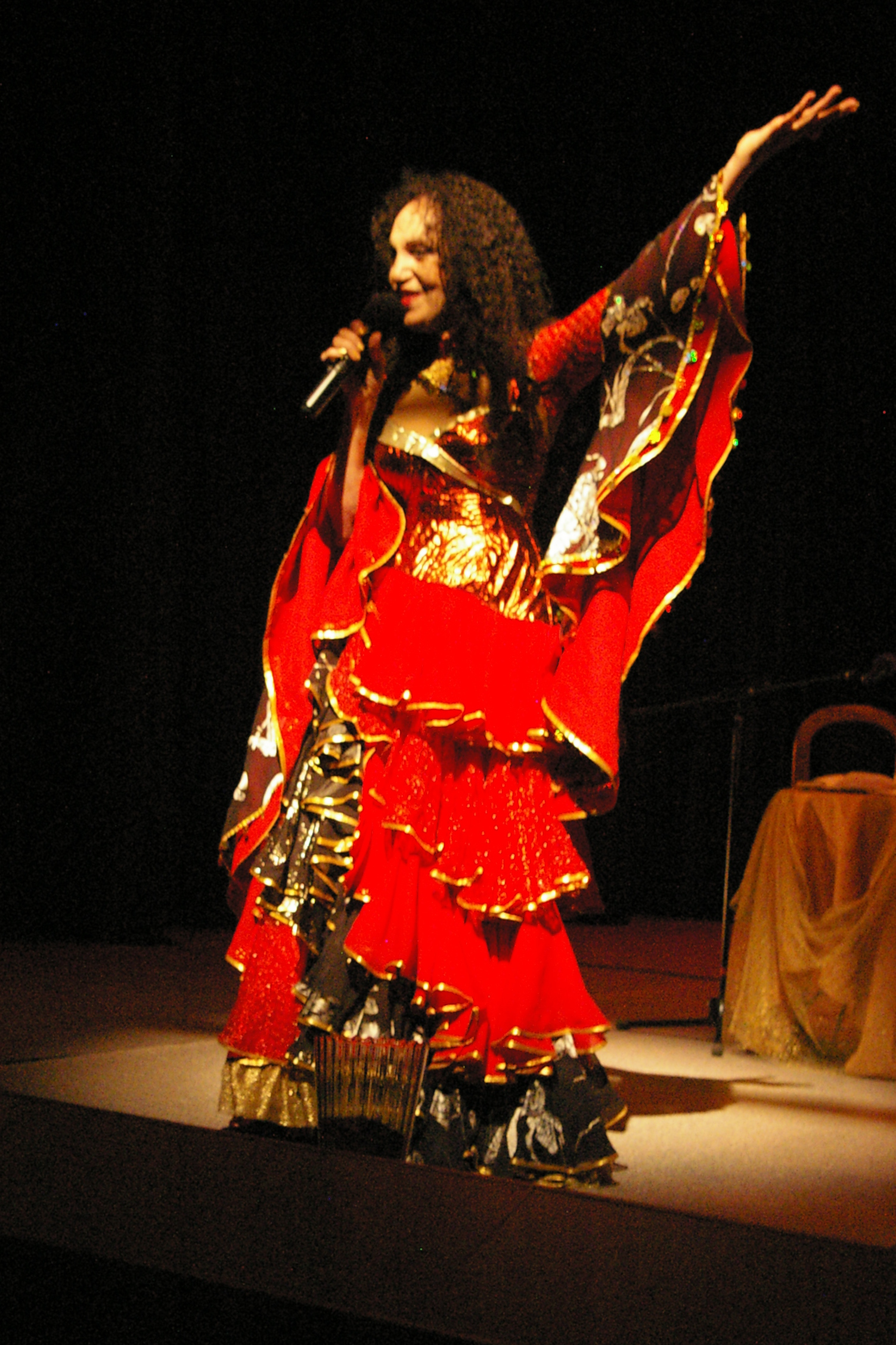 Валентина Пономарёва. Концерт в Вильнюс - 2011г.